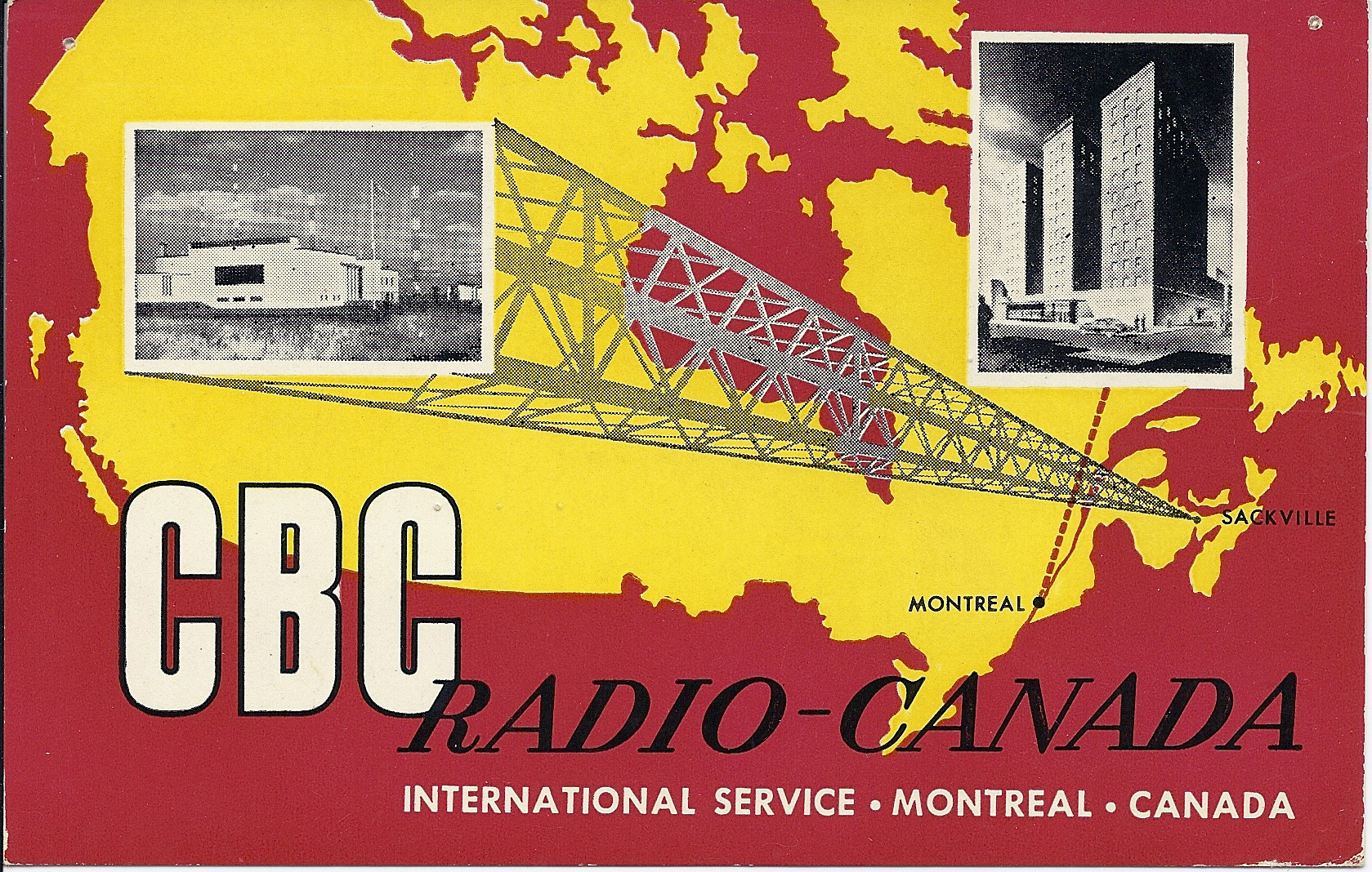 QSL Card, CBC Radio-Canada, 1956 (Side A)